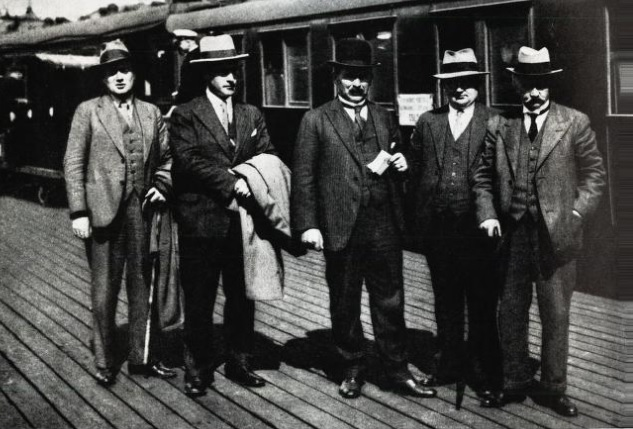 Færøyske politikere på gjennomreise i Oslo, ca. 1944. Fra venstre: Edward Mitens, Kristian Djurhuus, Jóannes Patursson, Peter Mohr Dam og Ole Frederik Joensen.